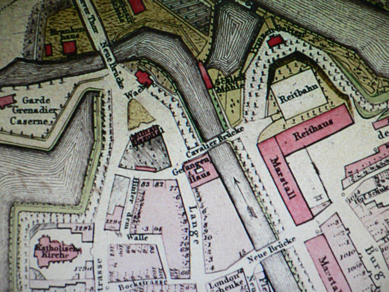 Hannover Stadtplan 1822 (Ausschnitt) Clevertor Reitbahn Reithaus Marstall Gefangen Haus Garde Grenadier Kaserne Basilika St. Clemens Militärhospital Cavalierbrücke Neue Brücke Lange Straße Am Hohen Ufer Leine Burgstraße London-Schenke Clevertor-Wache Goethestraße Brühlstraße Leibnizufer Mike-Gehrke-Promenade